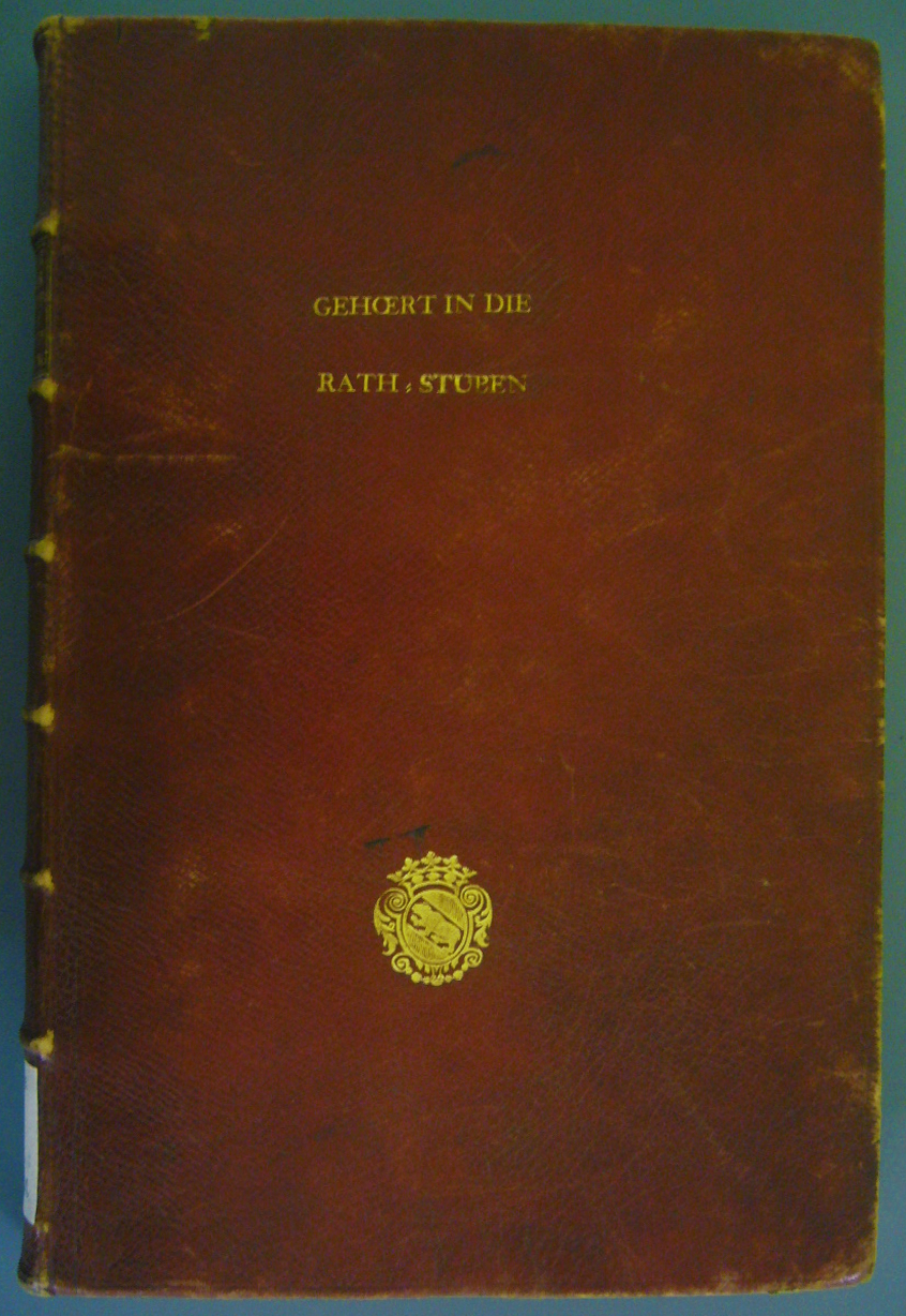 Materialregister zum Roten Buch, 18. Jh. Staatsarchiv Bern, A I 51a